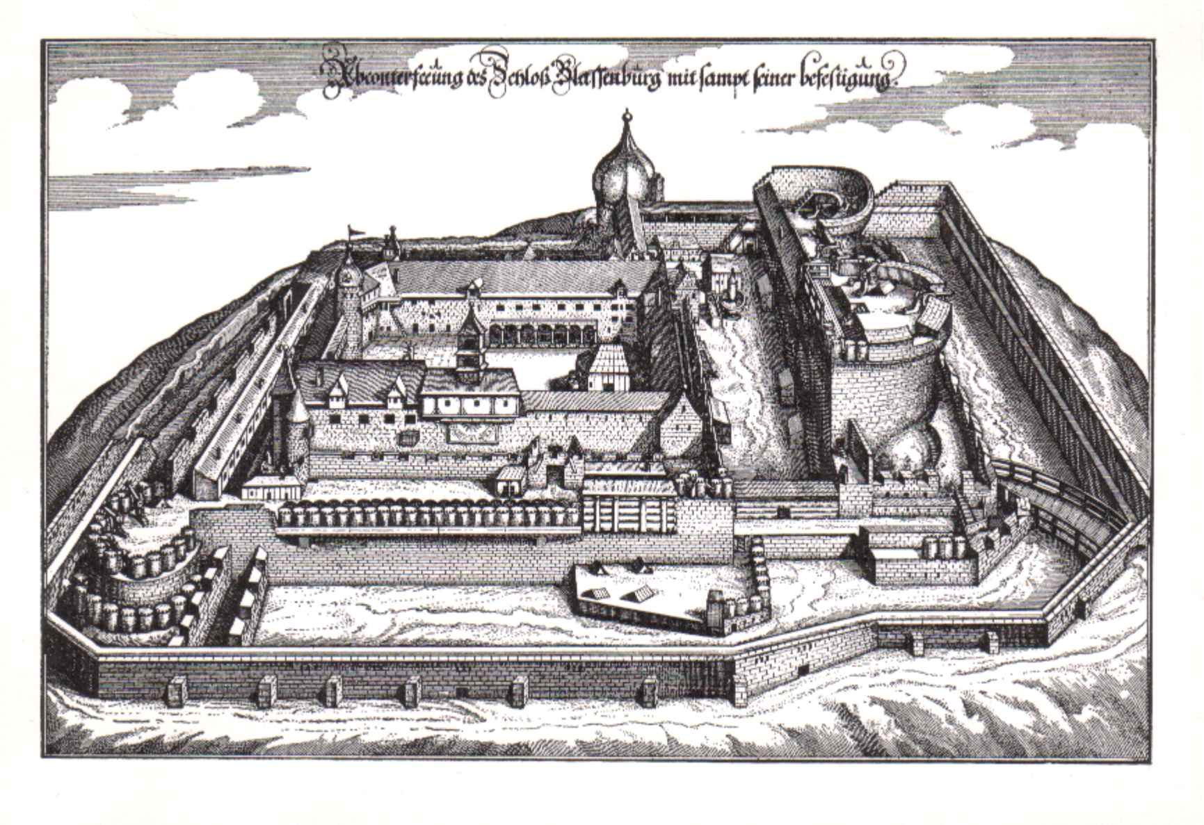 "Abconterfeeung des Schloß Blassenburg mit sampt seiner befestigung." Die Abbildung gibt die Plassenburg nicht in ihrem damaligen Zustand wieder sonder ihr Aussehen vor der Zerstörung von 1554. Als Vorlage haben wohl die 1560 in Augsburg verlegten Holzschnitte David de Neckers gedient. - Ansicht von Süden.